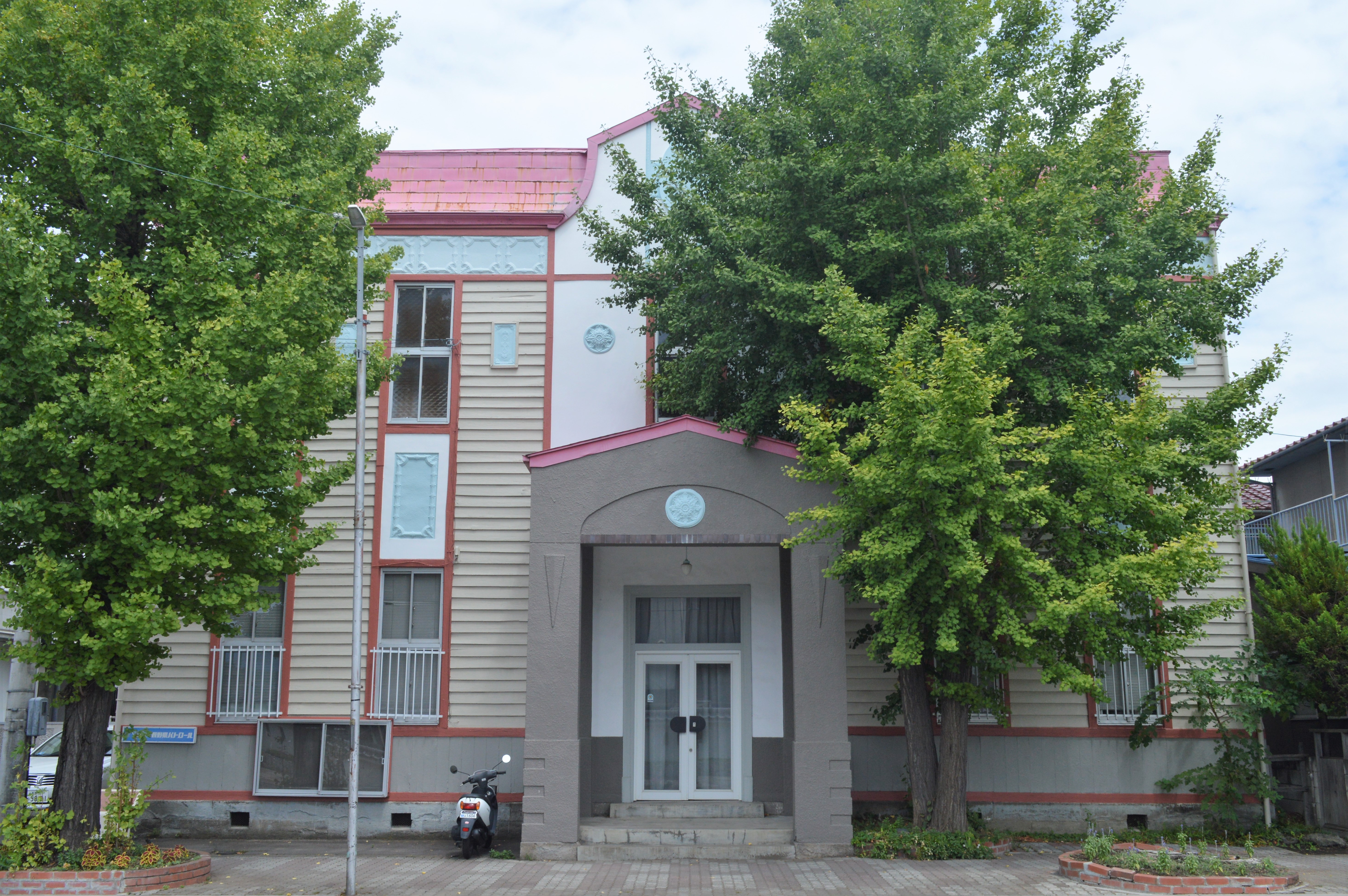 旧上田市立図書館。1915年から1970年まで図書館だった。2015年までは蚕都上田館。現在は石井鶴三美術館。